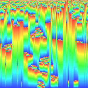 Bak Sneppen Model sample visualization